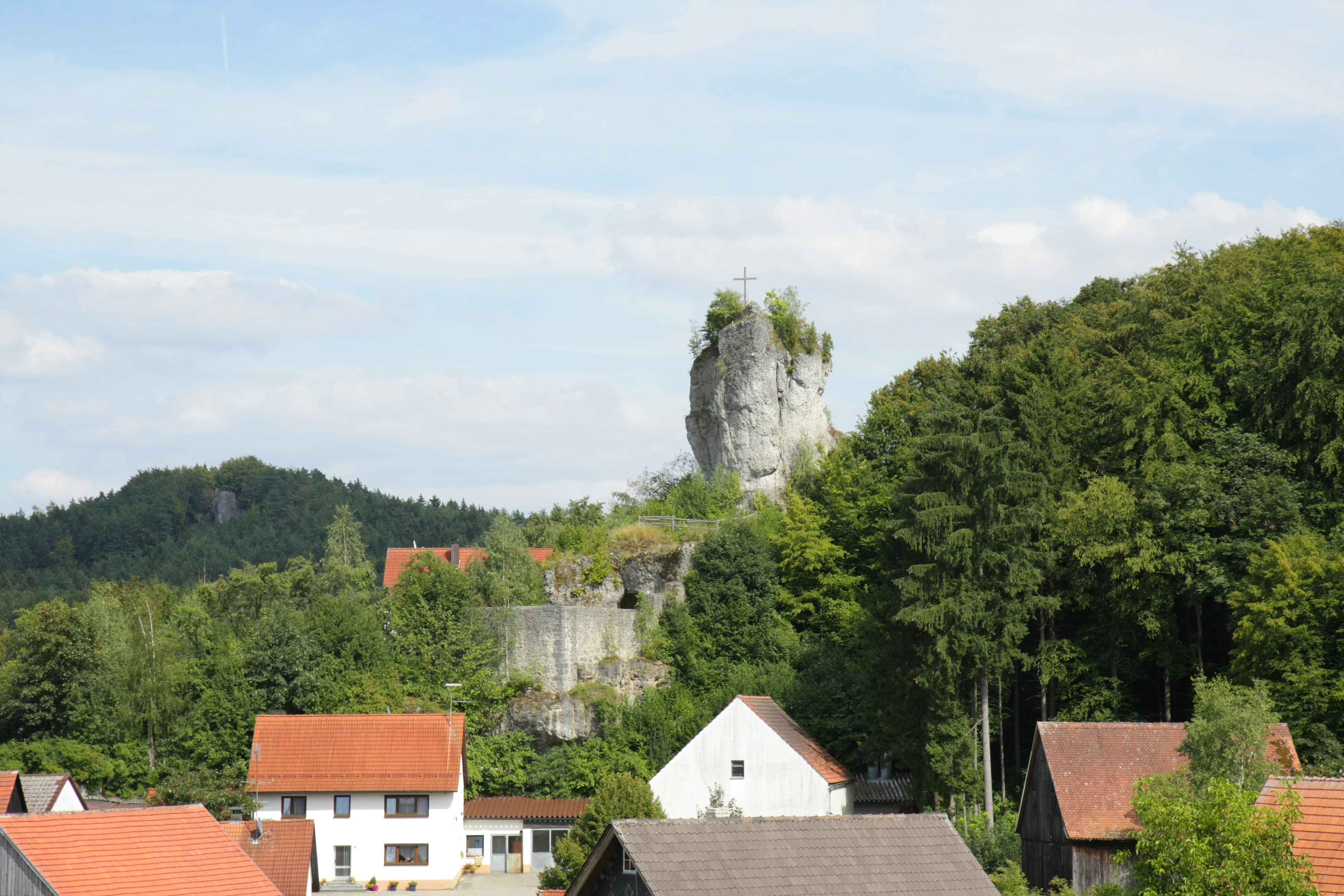 Burgruine Bärnfels von Westen